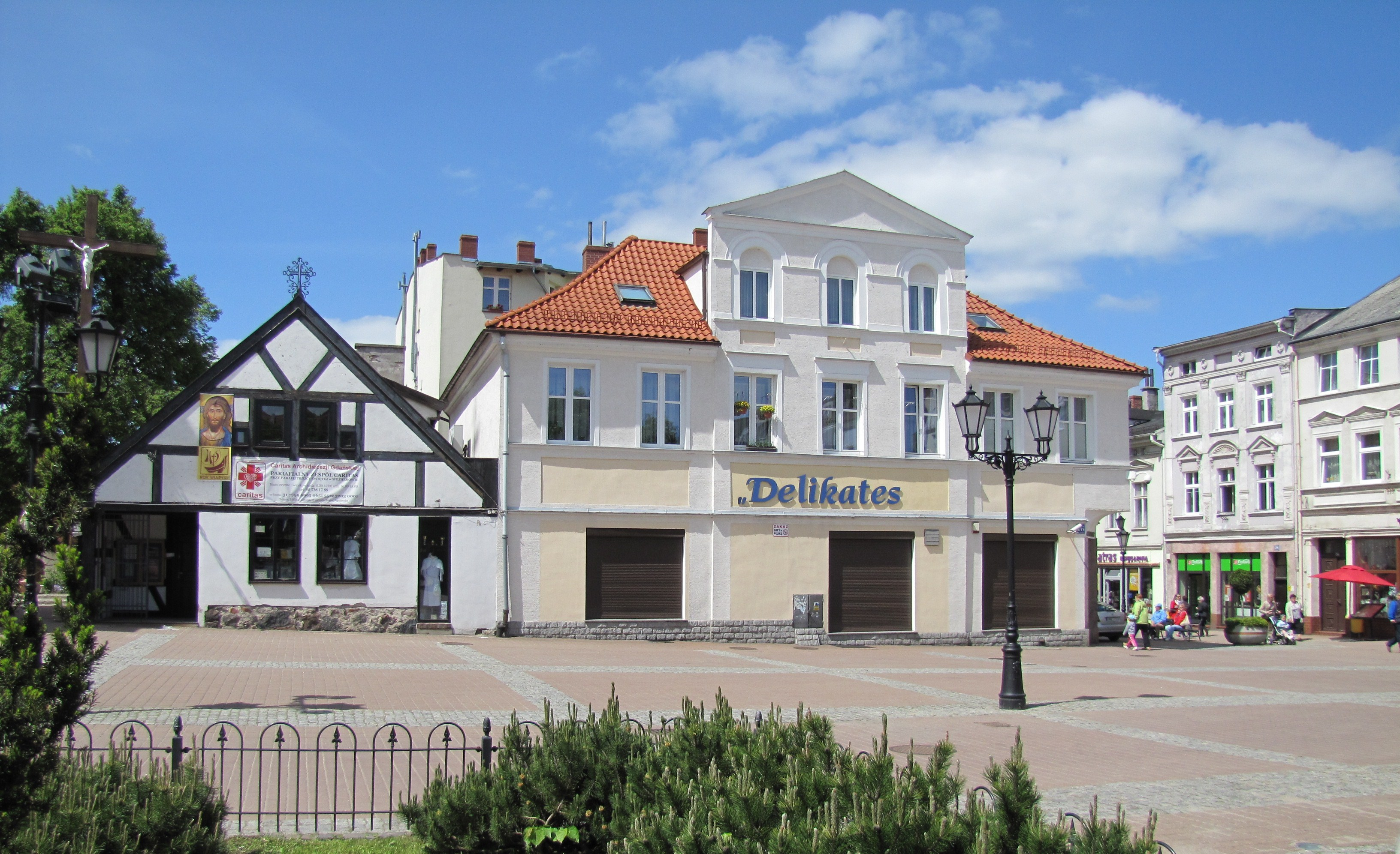 Delikatesy w Rynku.